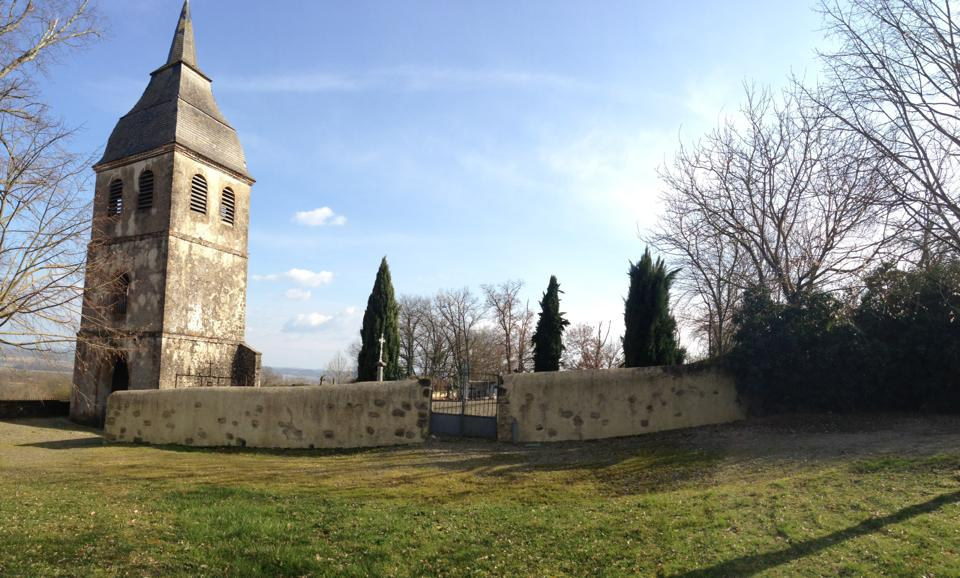 Le clocher de la madeleine